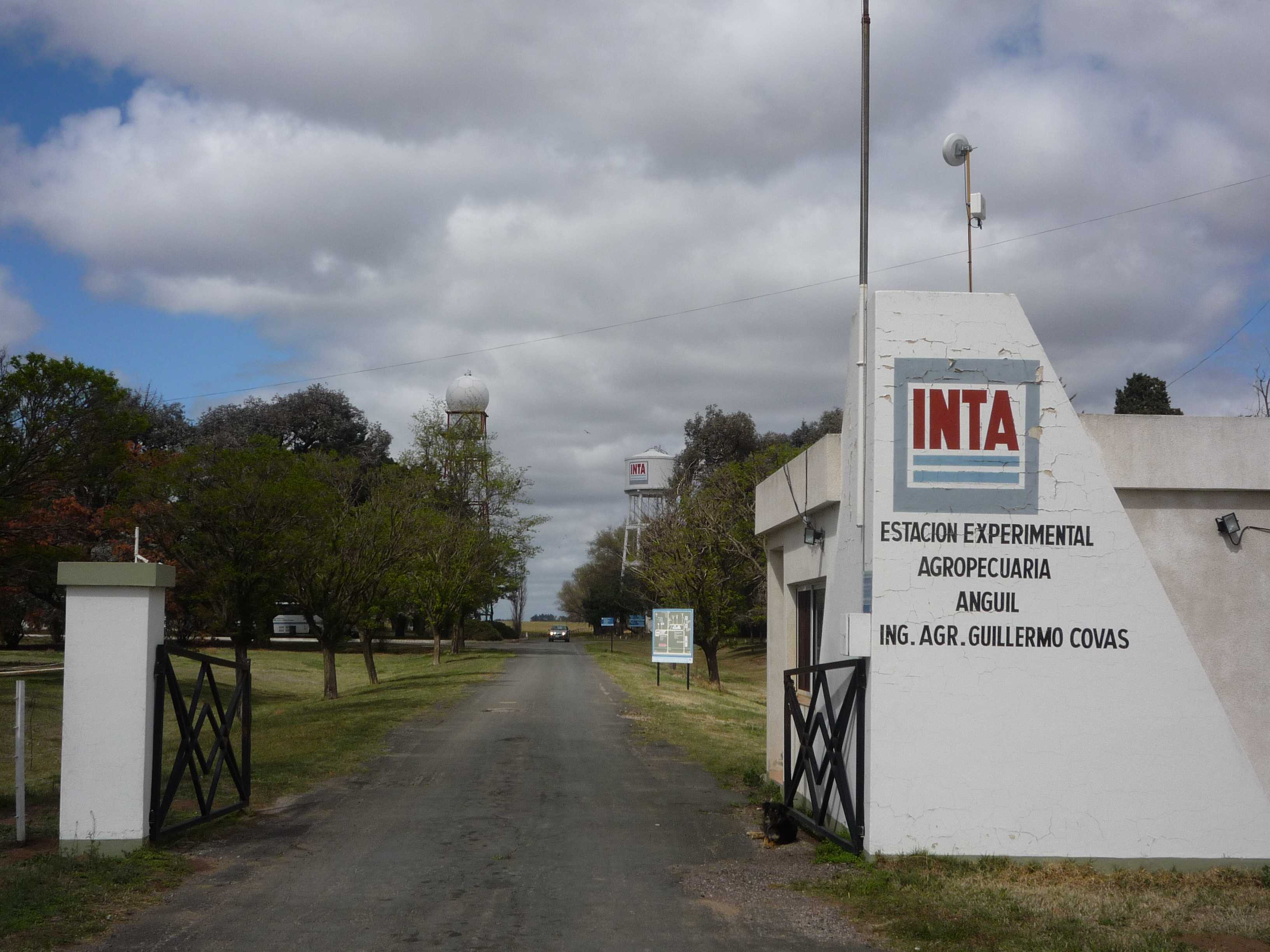 Entrada a la Estación Experimental Anguil